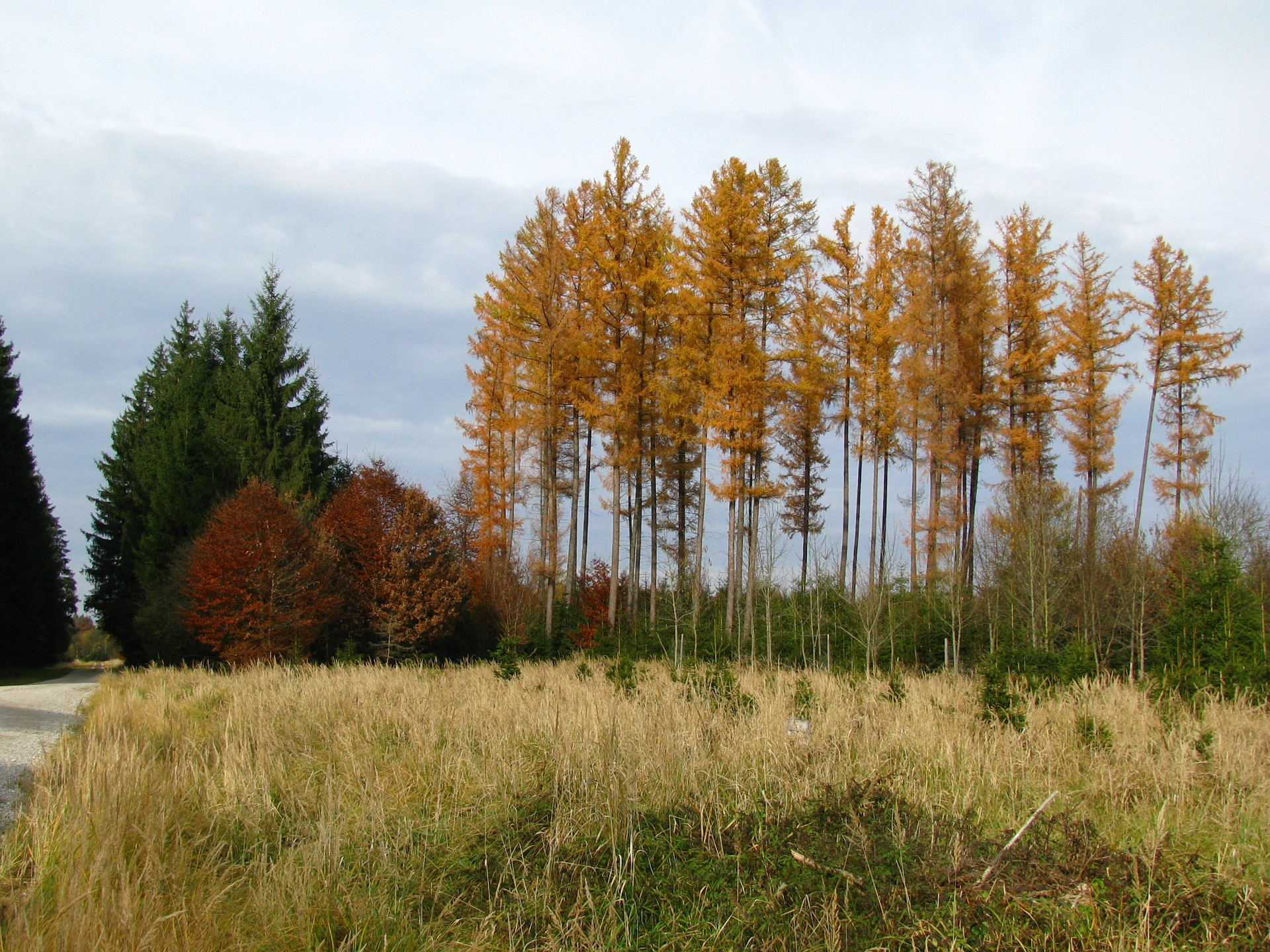 Gruppe von Lärchen (Larix decidua) im Herbst am Preysinggeräumt im Forstenrieder Park